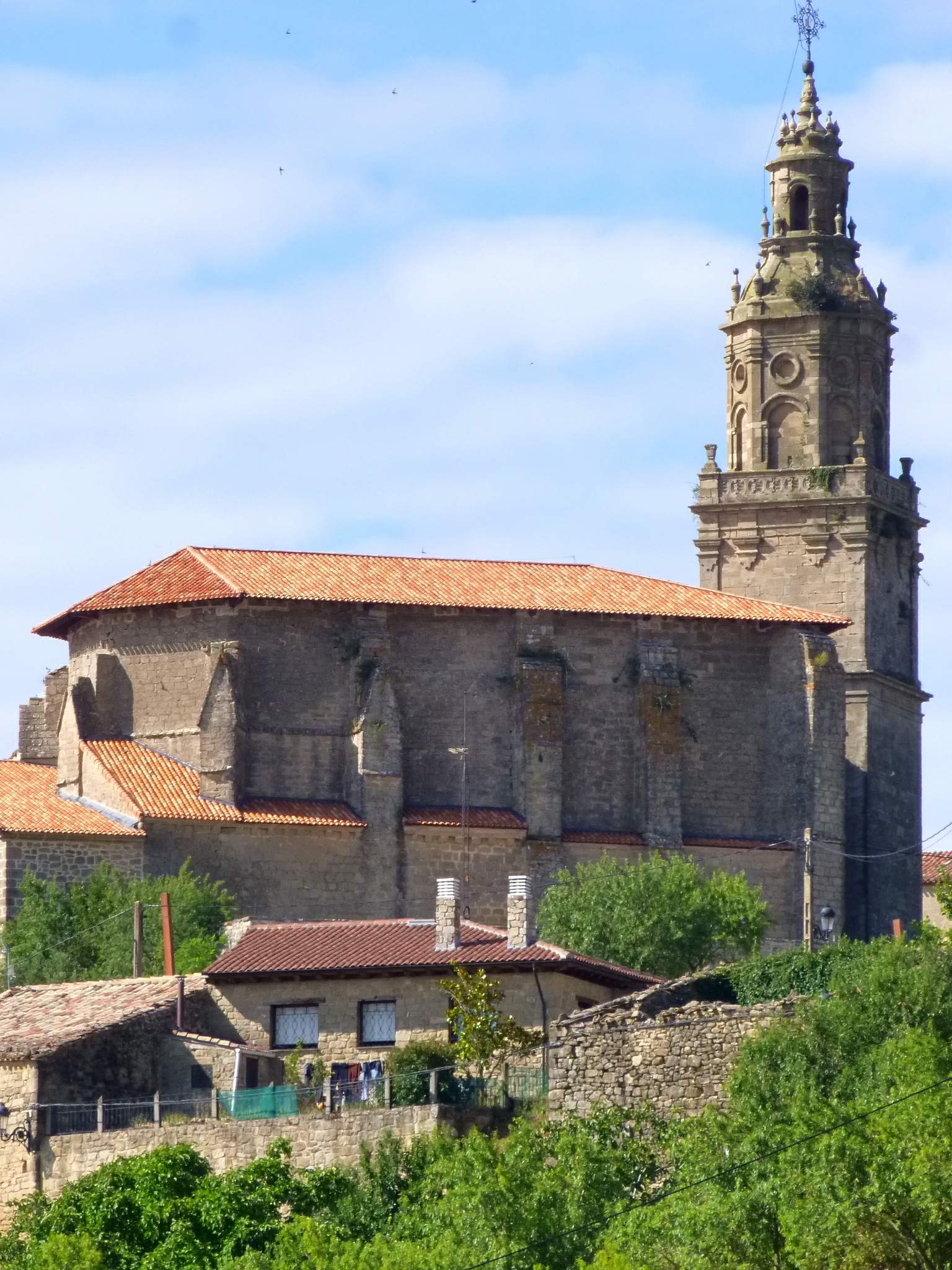 Iglesia de San Miguel (Labraza, Álava)